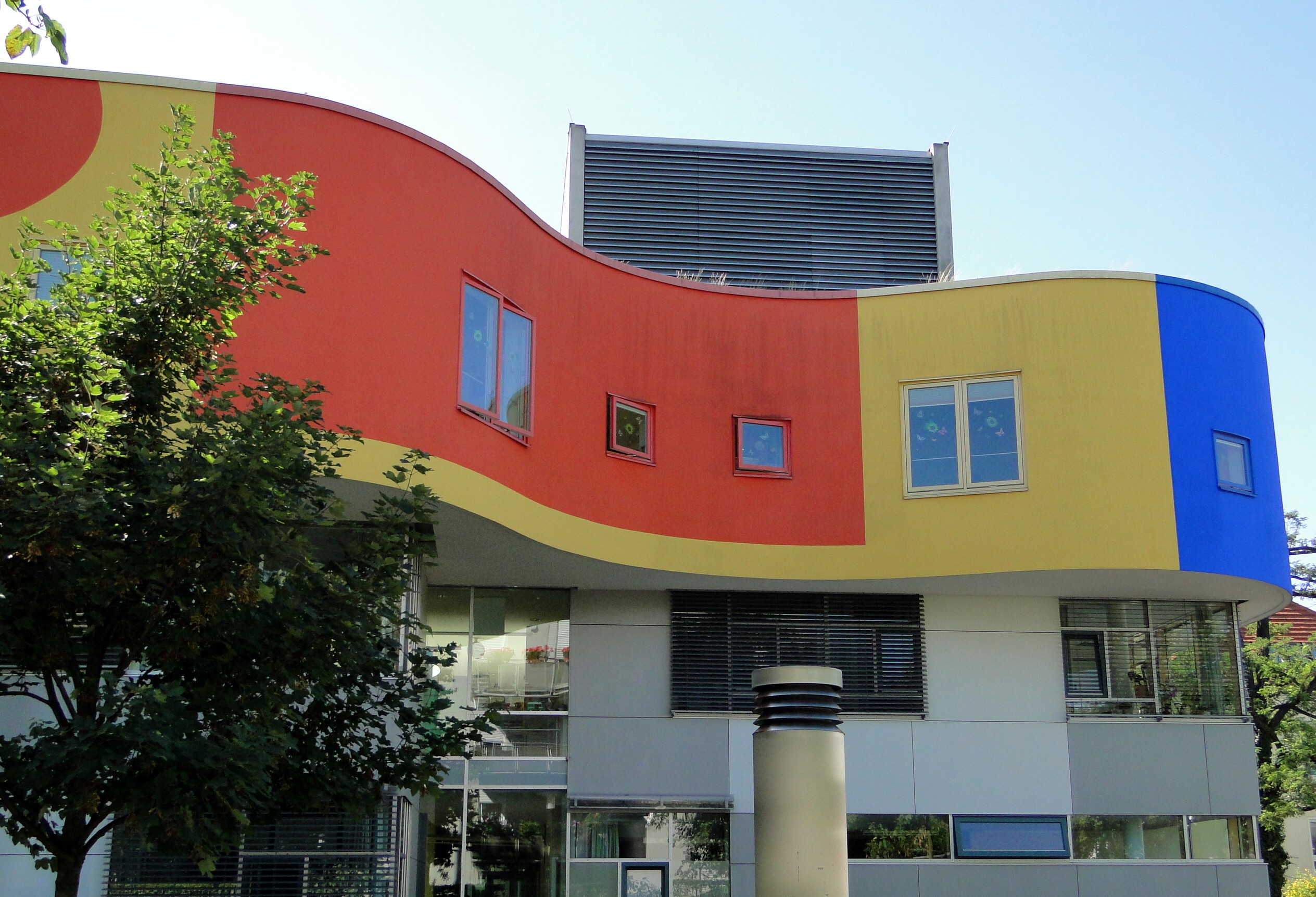 Mildred-Scheel-Haus, Erweiterungsbau, des Universitätsklinikums in Dresden